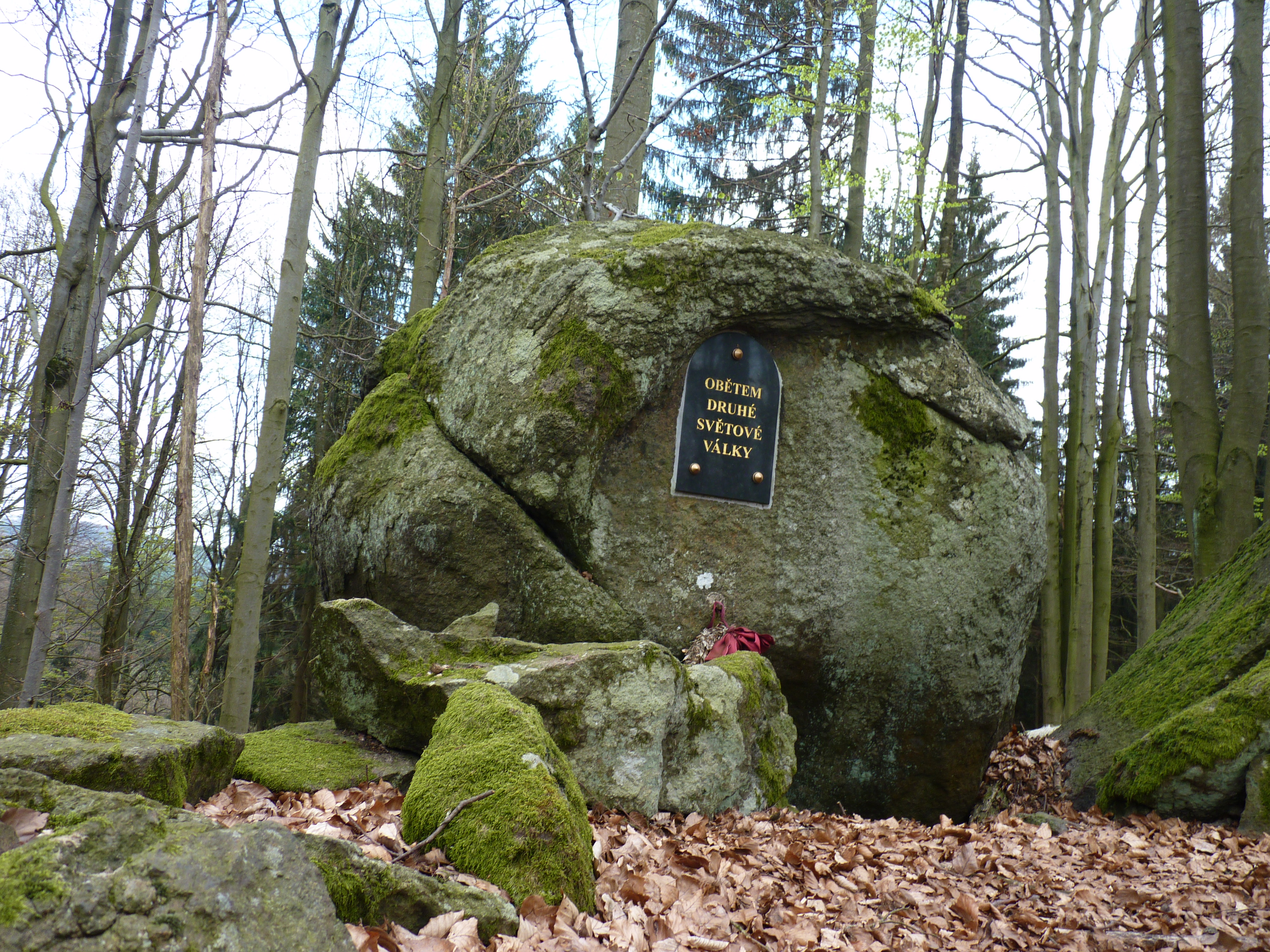 Kameny v centru přírodní památky.